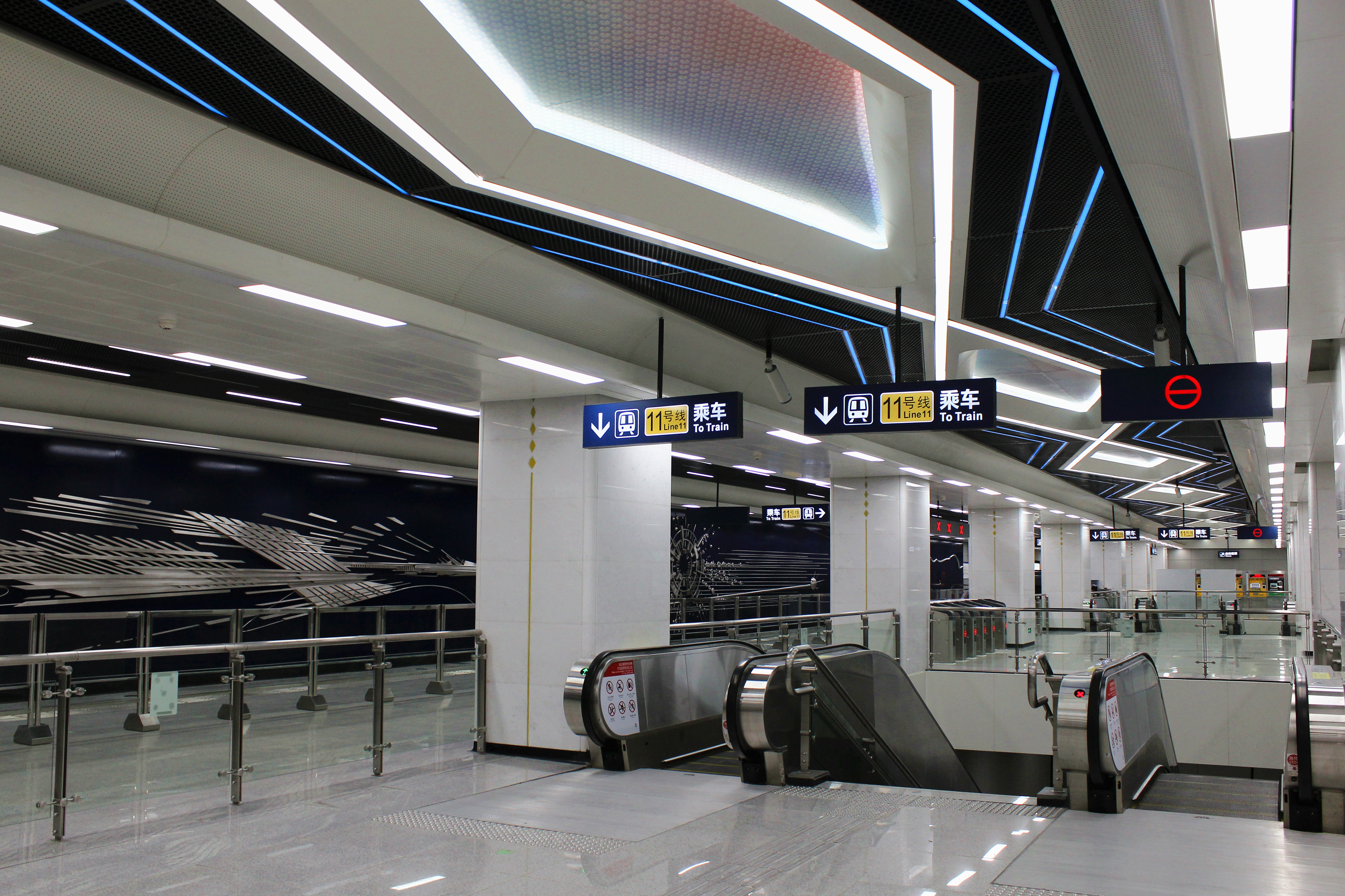 中文（中国大陆）: 武汉轨道交通11号线光谷火车站